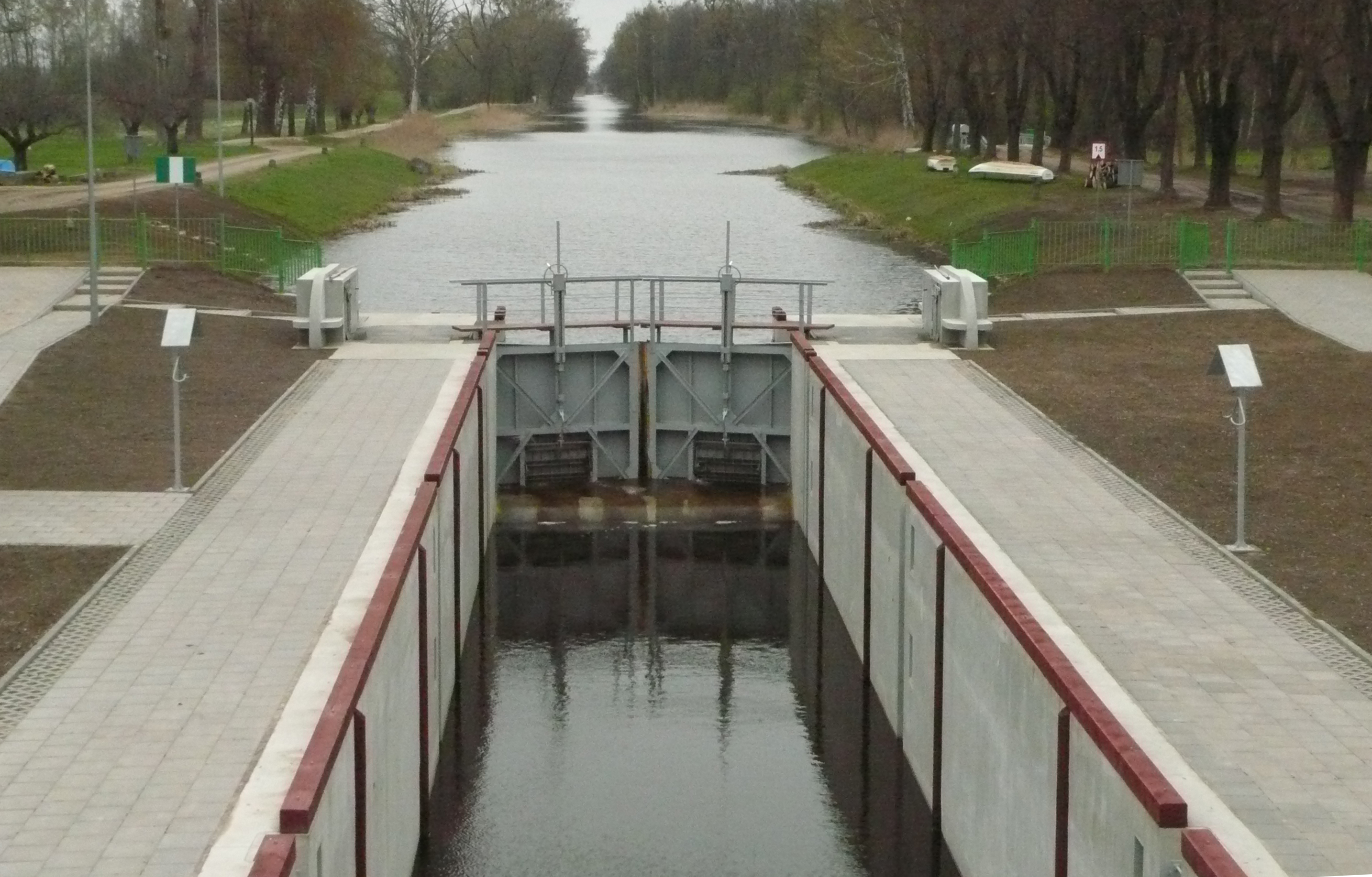 Górne wrota śluzy